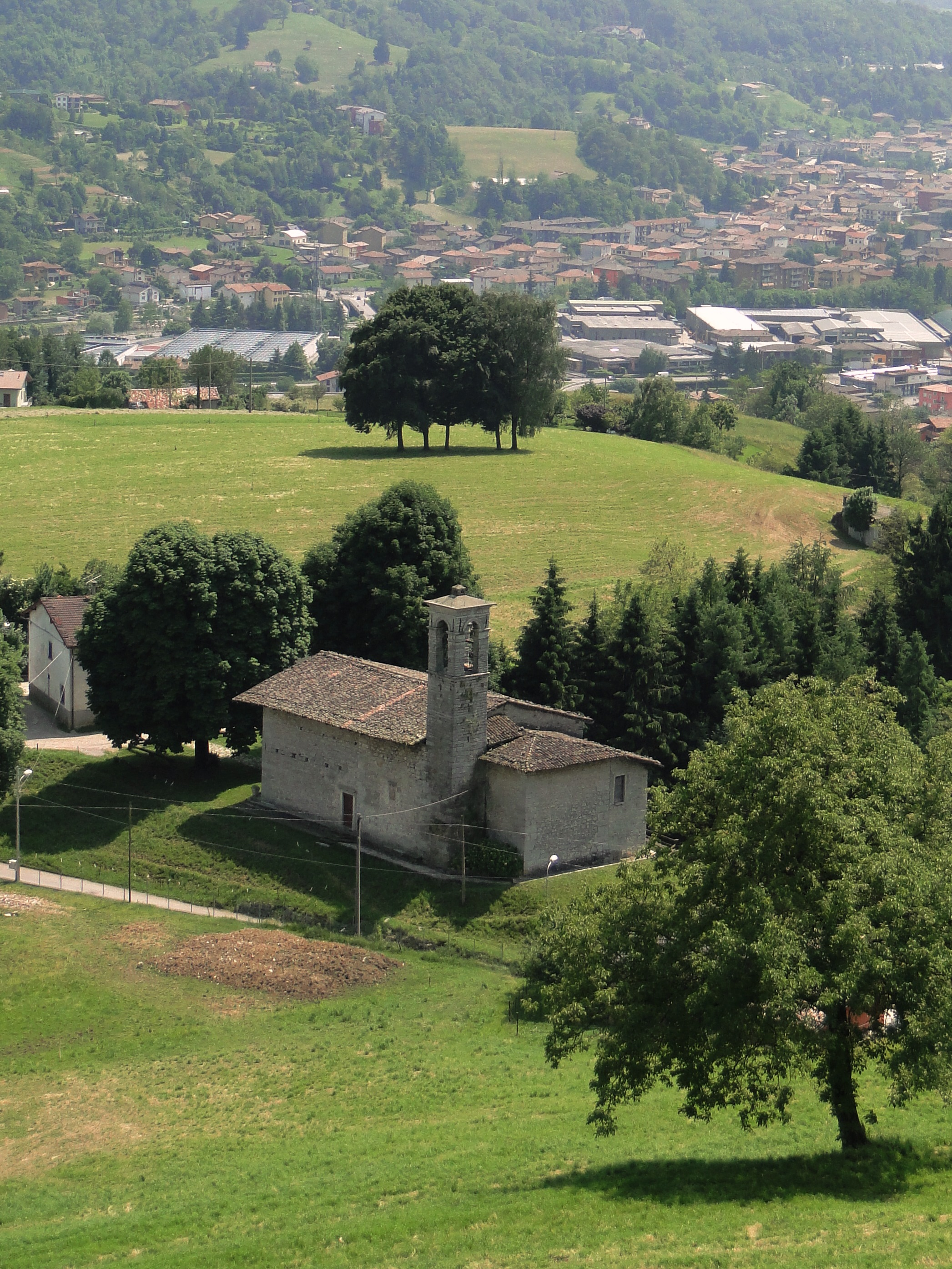 Chiesa di san Rocco. Gazzaniga (BG), Italia